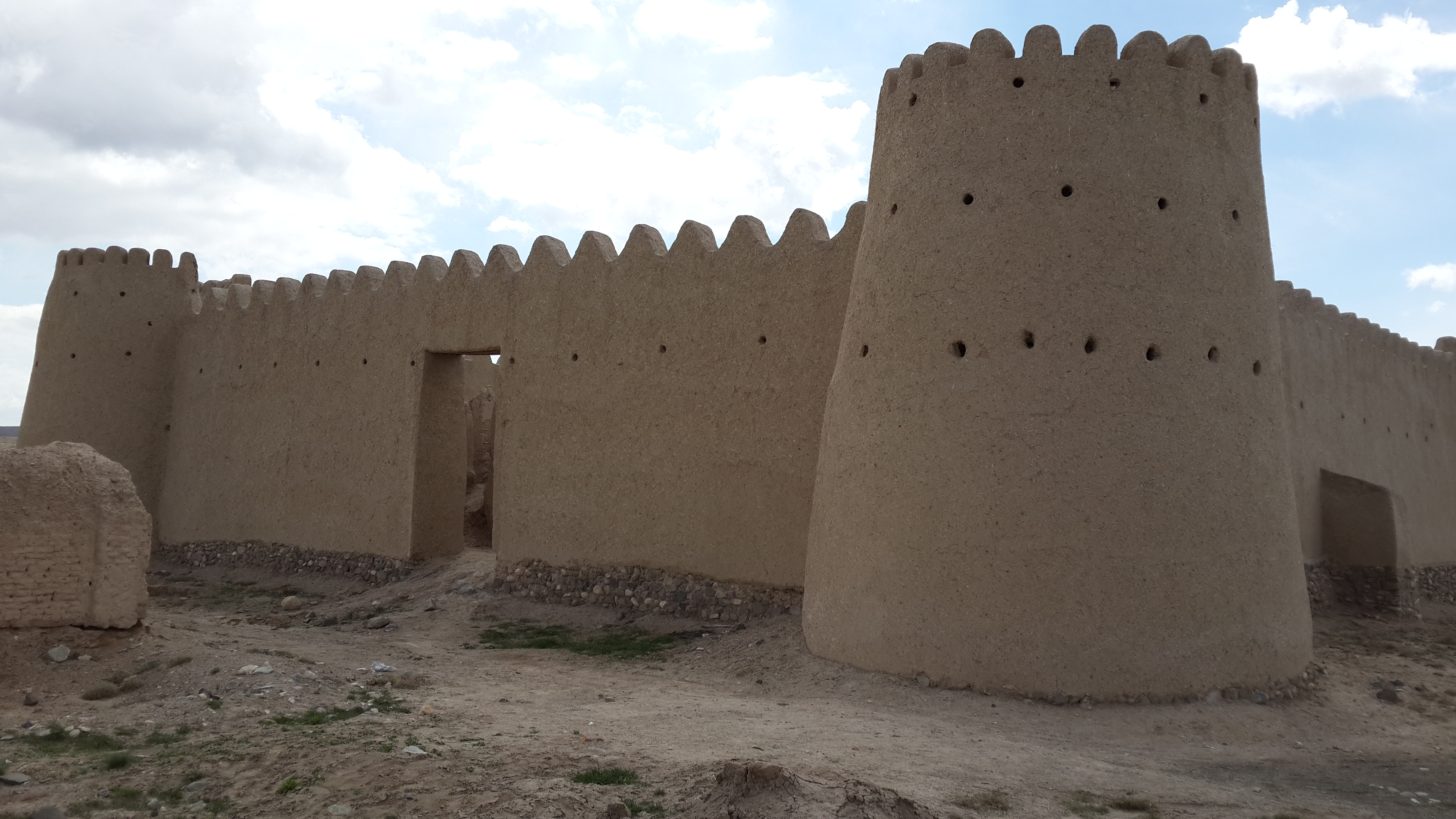 این قطعه اخیرا توسط سازمان میراث فرهنگی بازسازی شده است